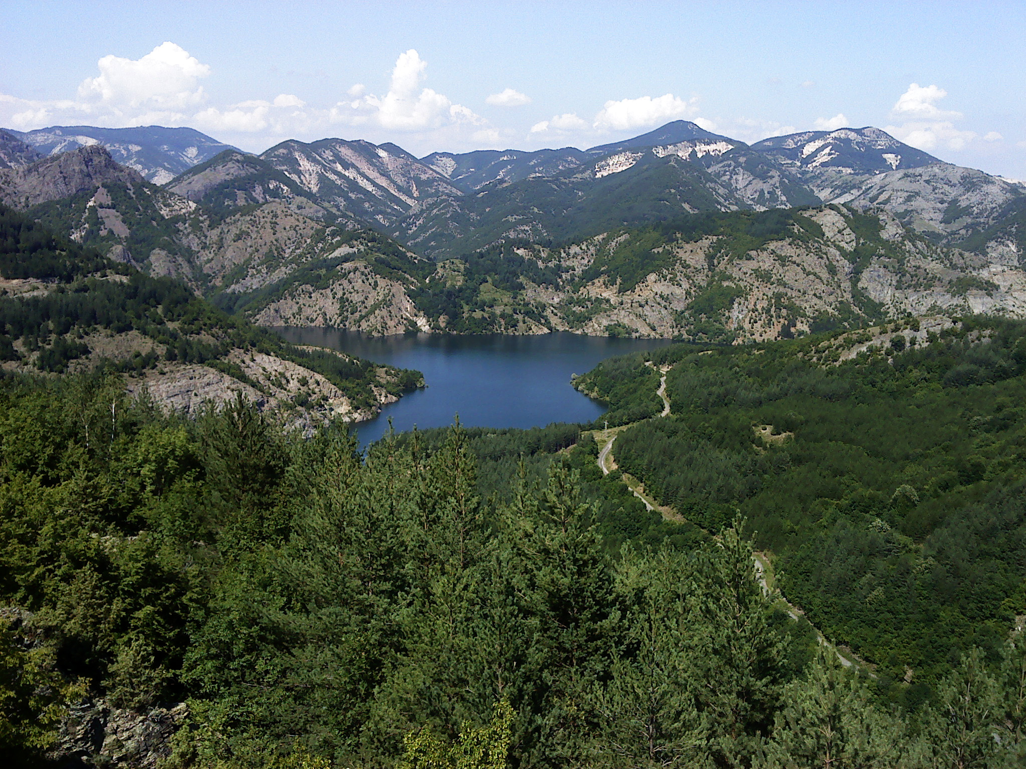 Част от яз.Боровица, погледнато от с. Безводно